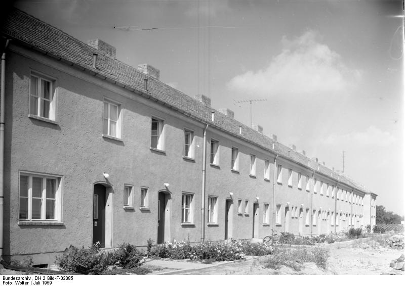 Brandenburg, AWG-Wohnungen AWG Bauten in Brandenburg [Brandenburg.- Wohnungen der Arbeiterwohnungsbaugenossenschaft]